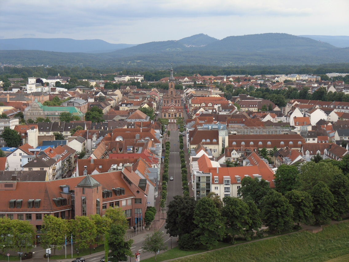 Überblick über Rastatt entlang der Kaiserstraße in Richtung Südosten, über das Rathaus und St. Alexander hinweg